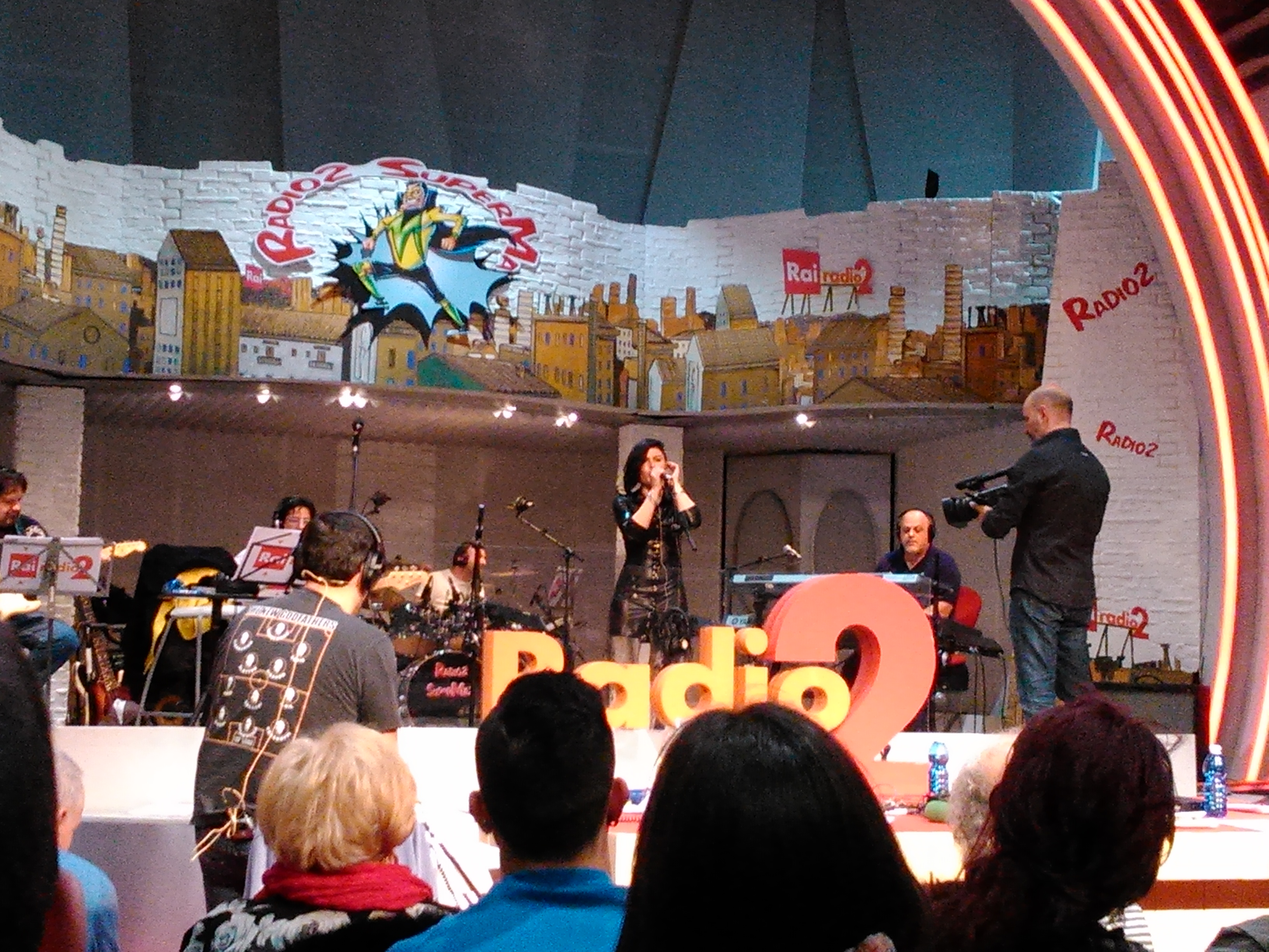 Giusy Ferreri negli studi di Rai Radio2